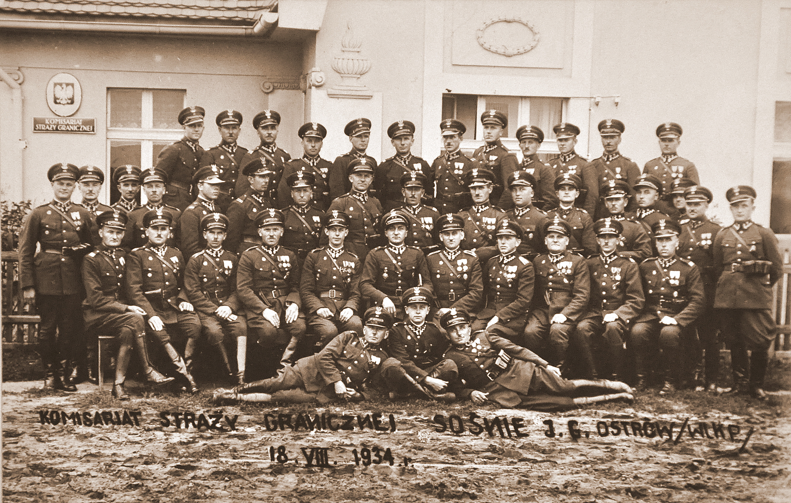 Obsada komisariatu SG Sośnie w 1933 roku